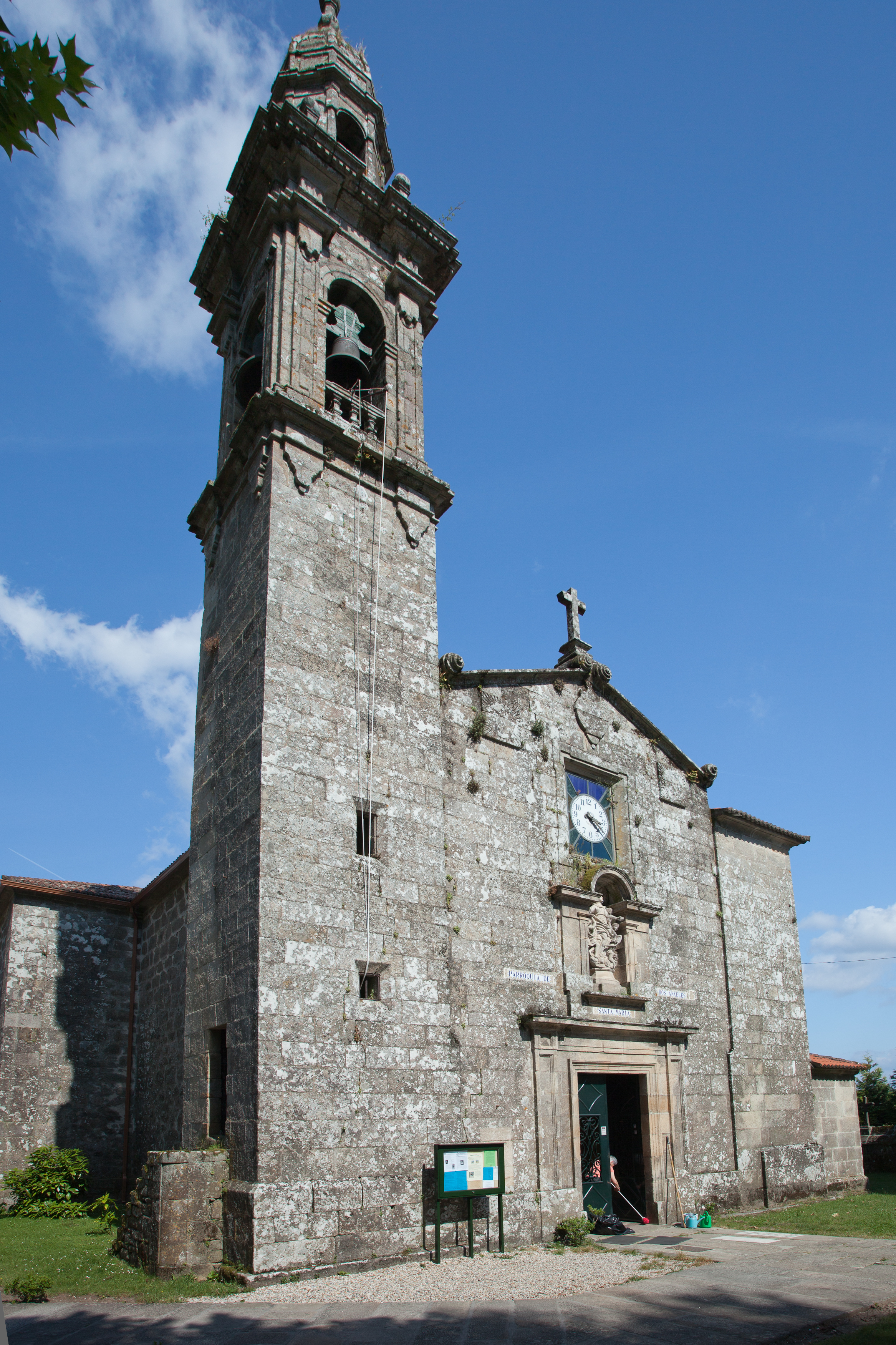 Igrexa parroquial, Os Ánxeles, Brión, Galiza, España